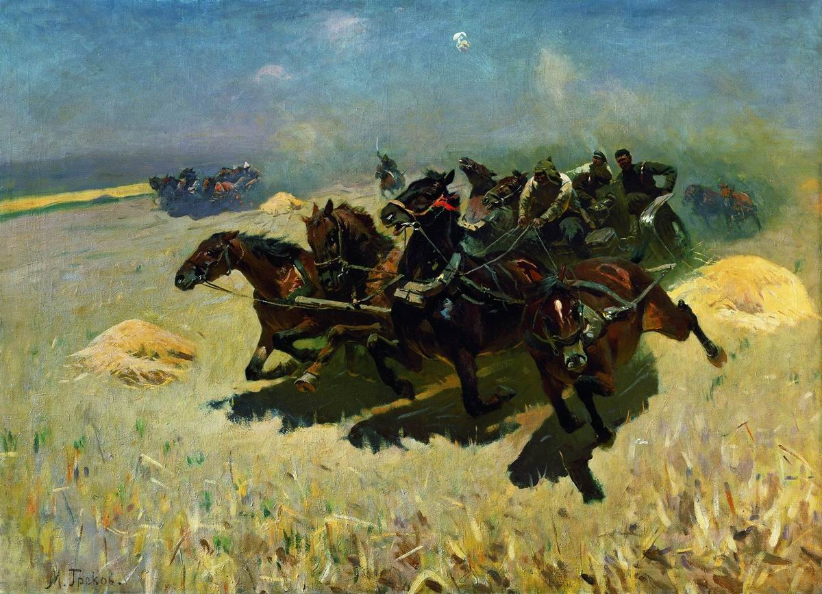 Тачанка. 1925 Холст, масло. 83 x 114 см Государственная Третьяковская галерея